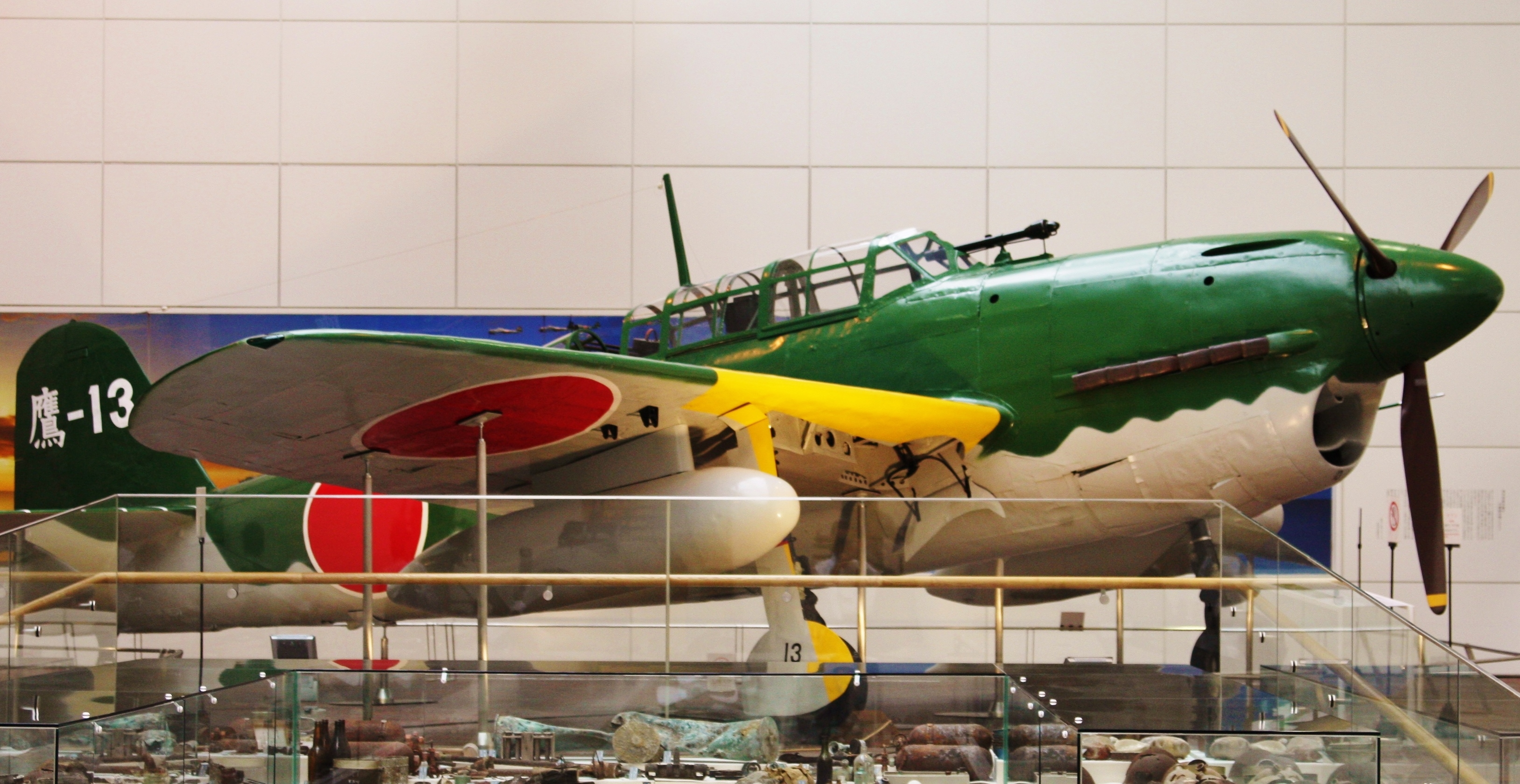 ２０１６年１０月２１日遊就館の許可のもと撮影の画像